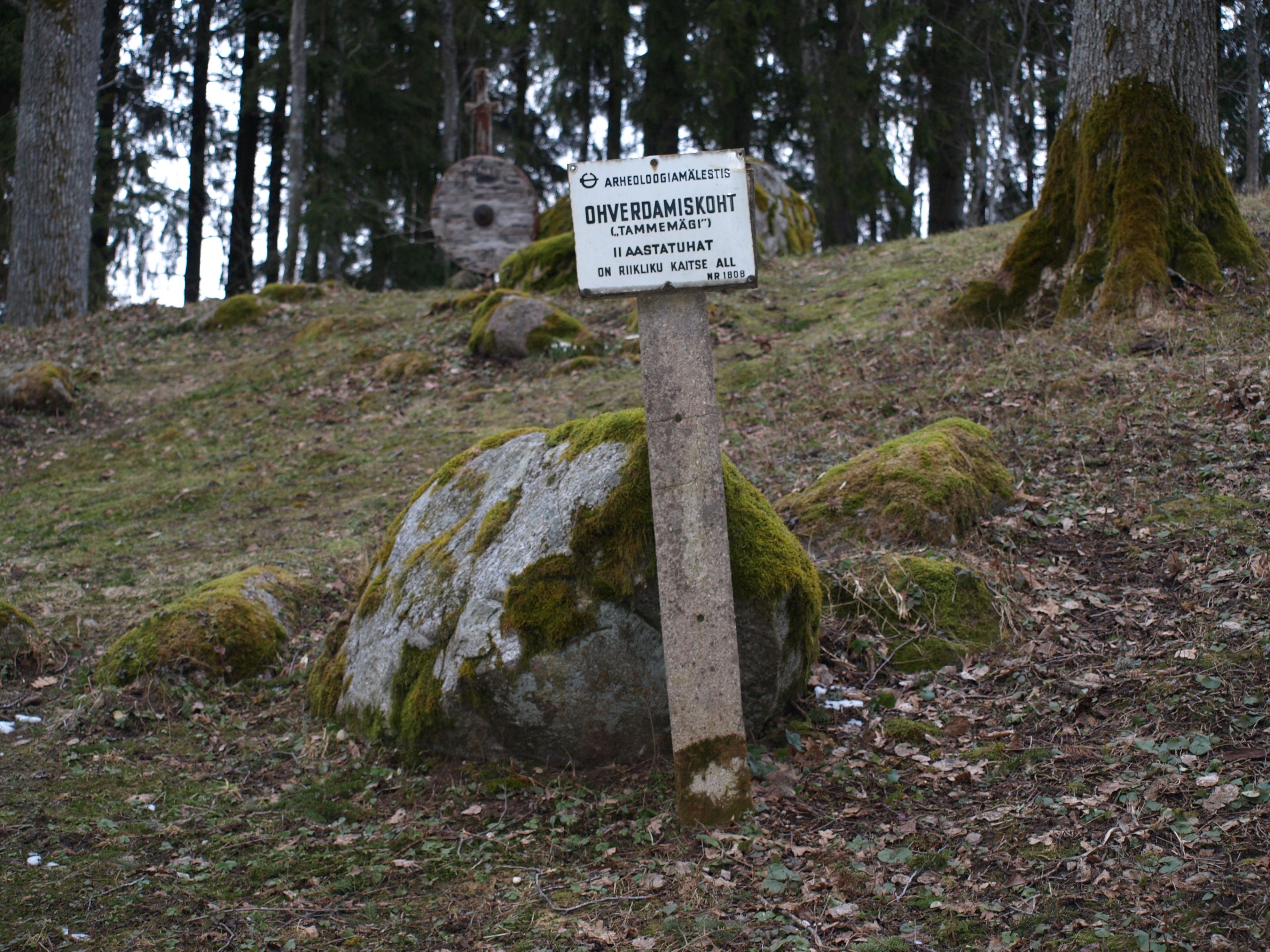 Legendide järgi lembitu ja 1400 Madisepäeva lahingus langenud eesti sõdalase haud